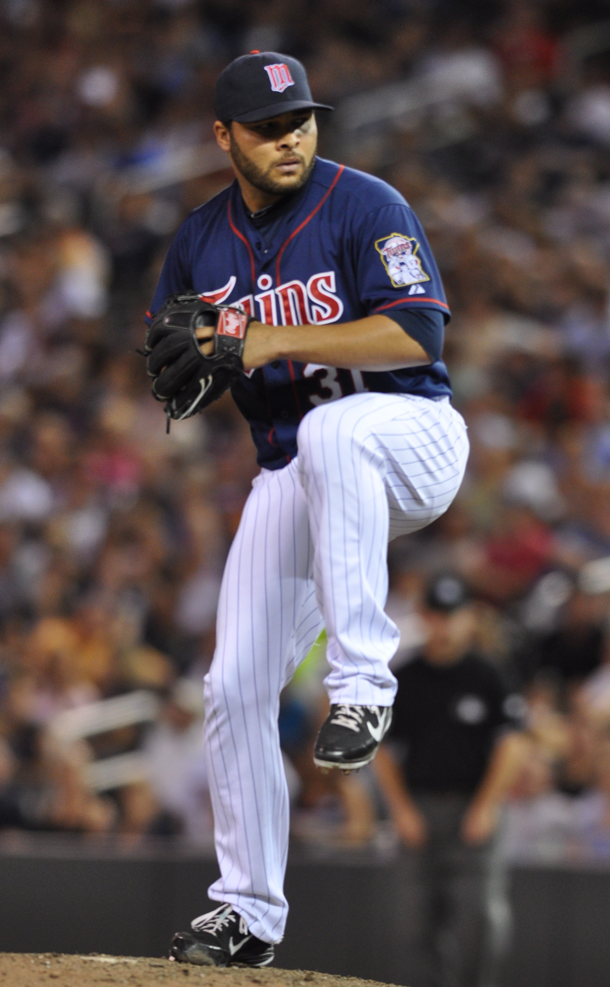 Alex Burnett